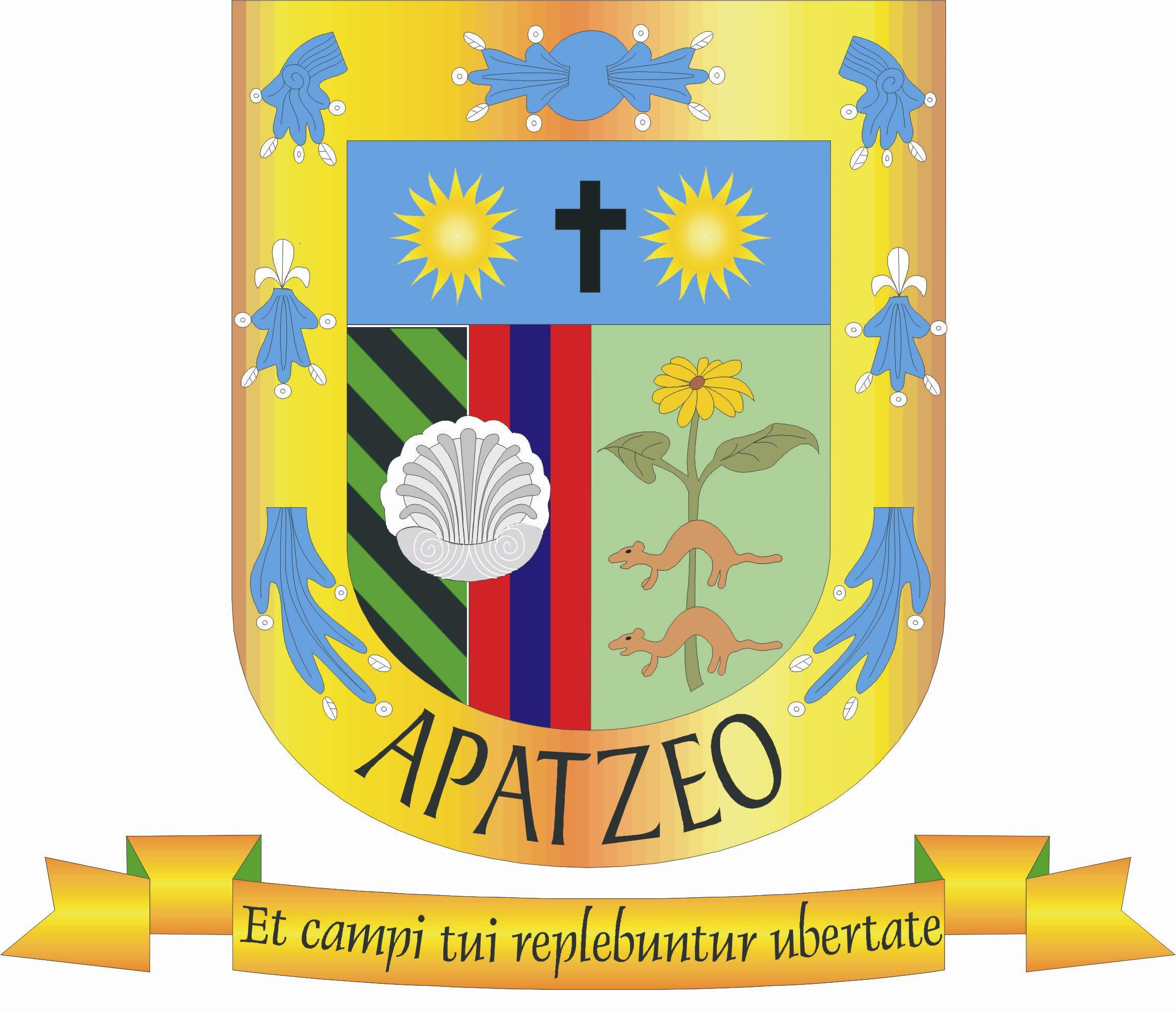 Escudo apaseo el grande